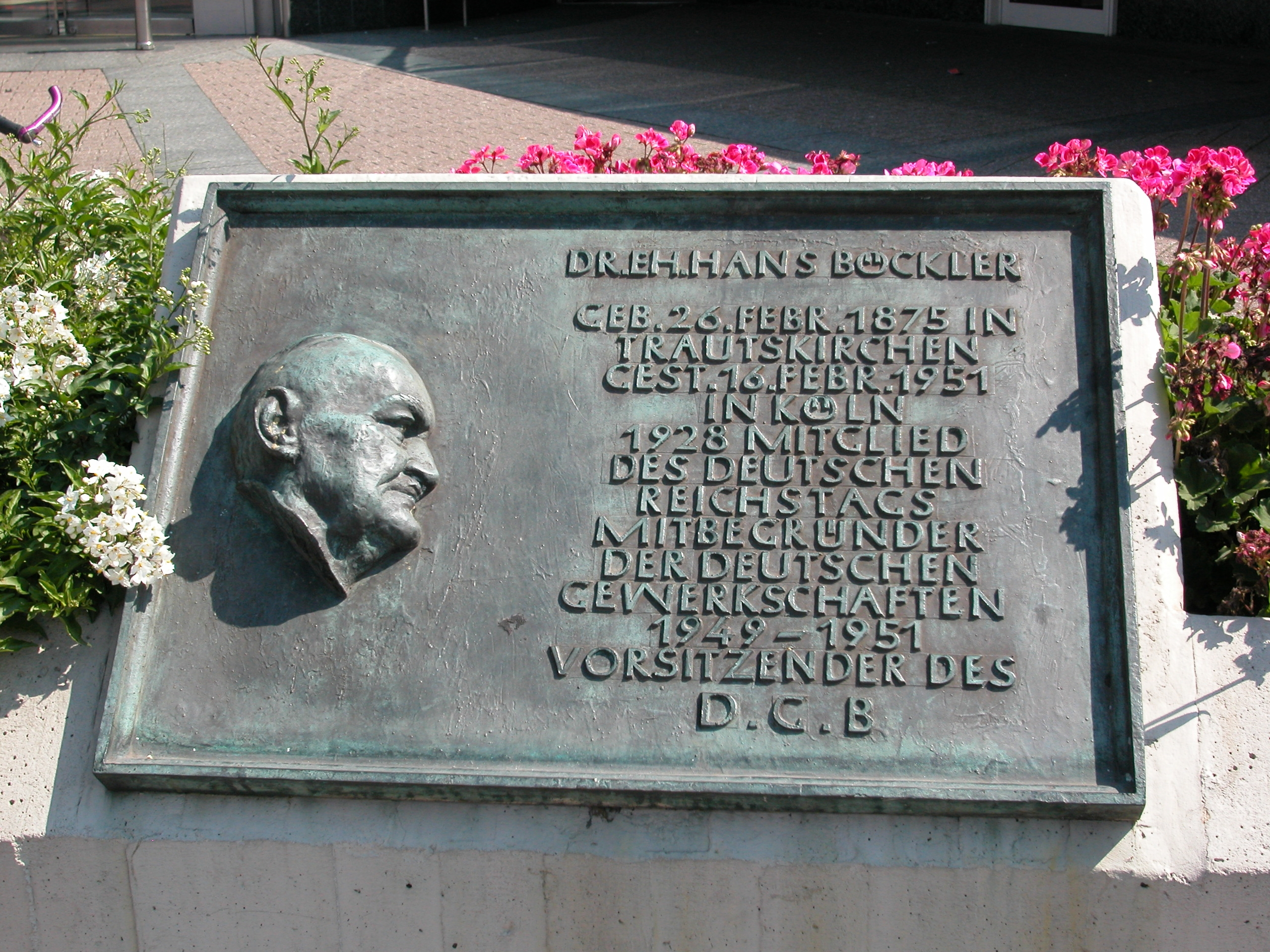 Böckler-Gedenktafel Position: 51°25′43.756″N 6°53′5.188″E / 51.42882111°N 6.88477444°E Hans-Böckler-Platz